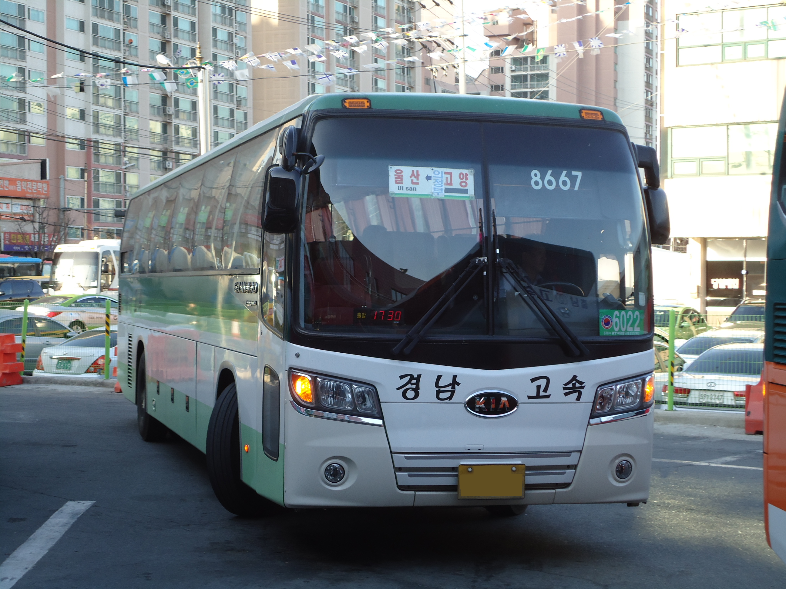 경남고속 뉴 그랜버드 파크웨이 28석 우등 (고양-의정부-울산)